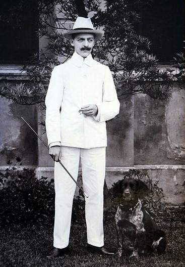 Fotografie von Kurt Schirmer, Vizekonsul in Schanghai